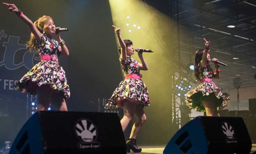 Berryz Kobo x °C-ute